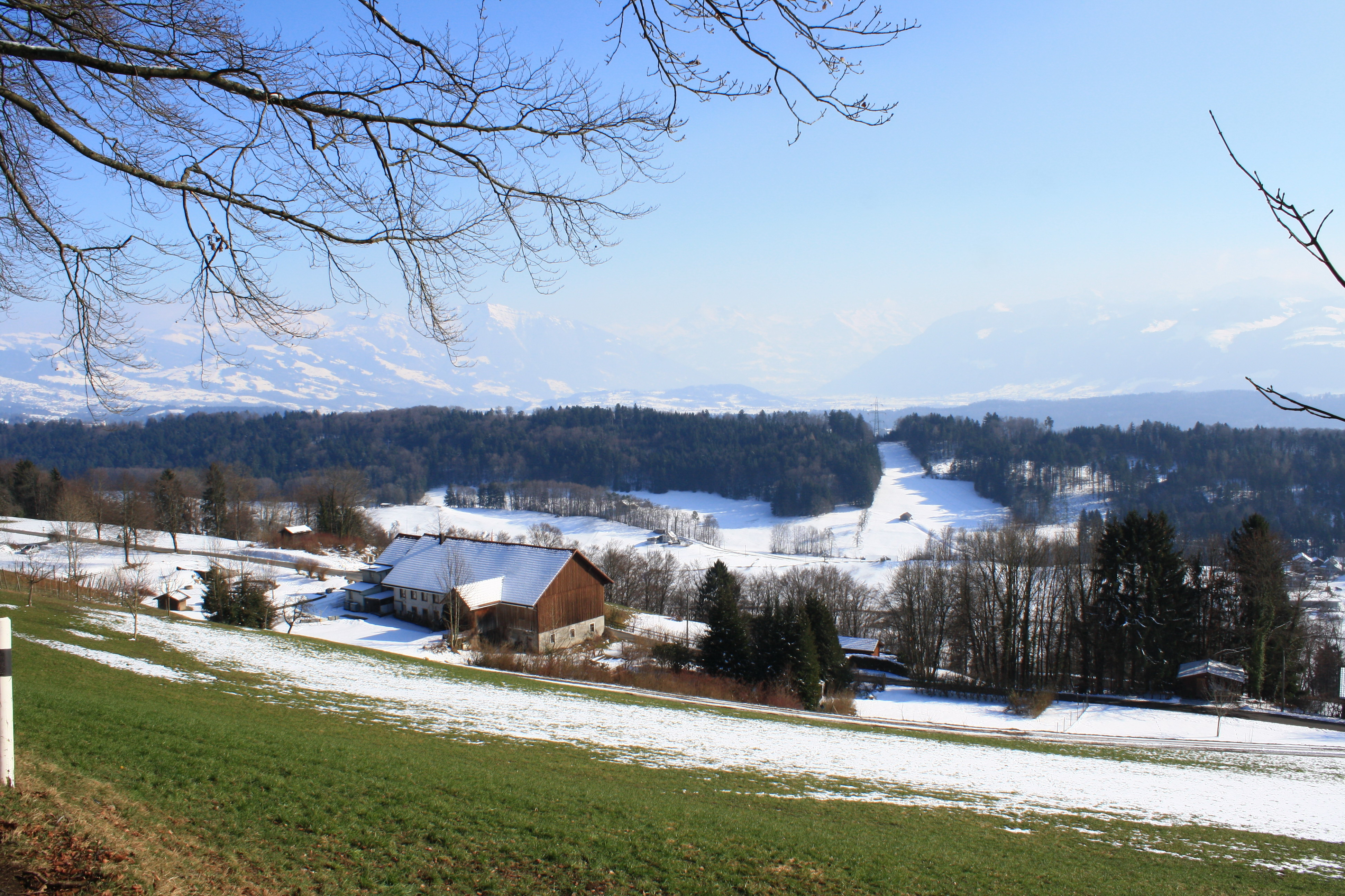 On Hiltisberg towards Güntisberg in Wald (Switzerland), Linthgebiet (Benkner Büchel) and Glarner Alpen in the background.